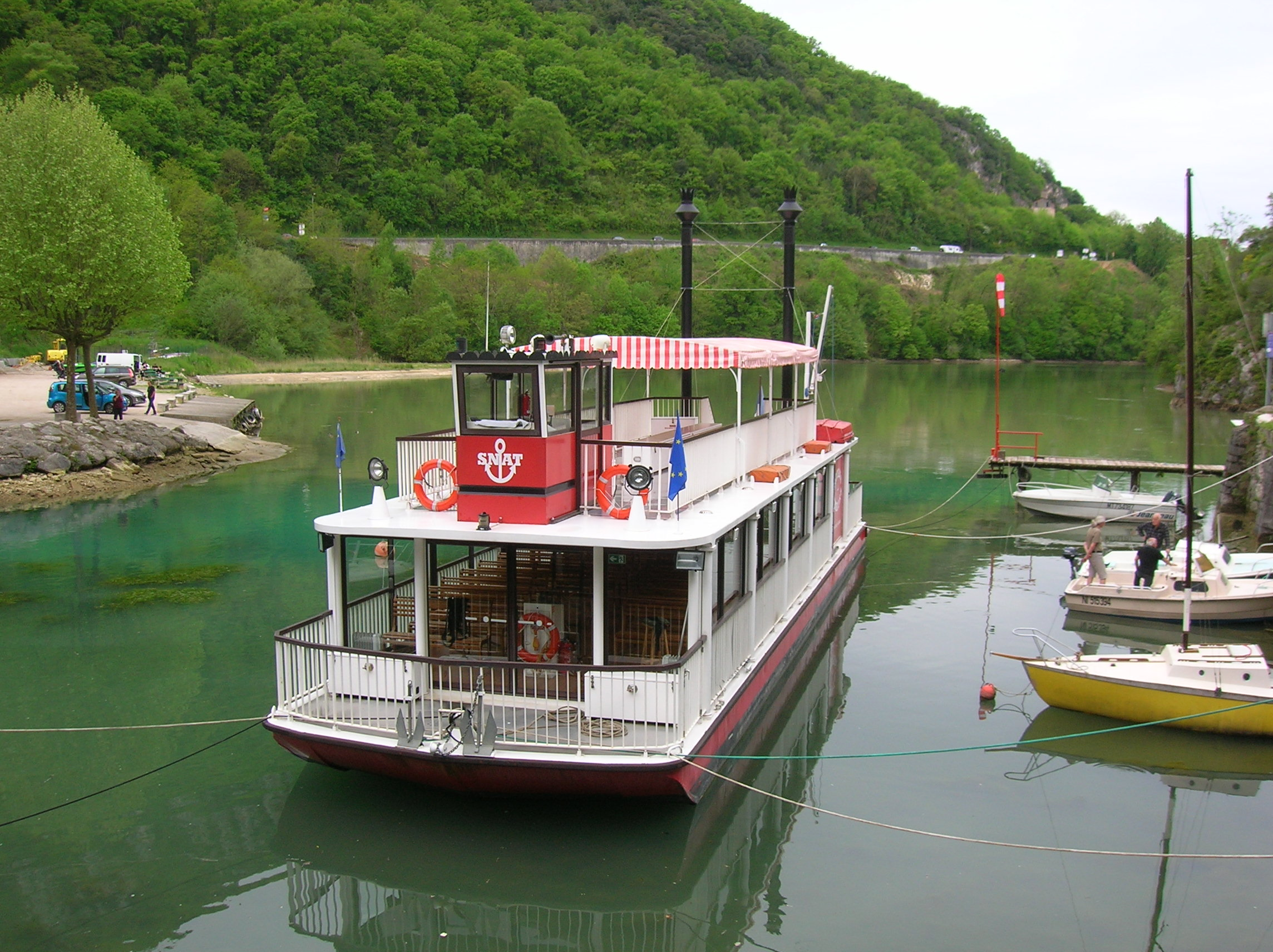 Bateau à roue, Saint-Nazaire-en-Royans, France.